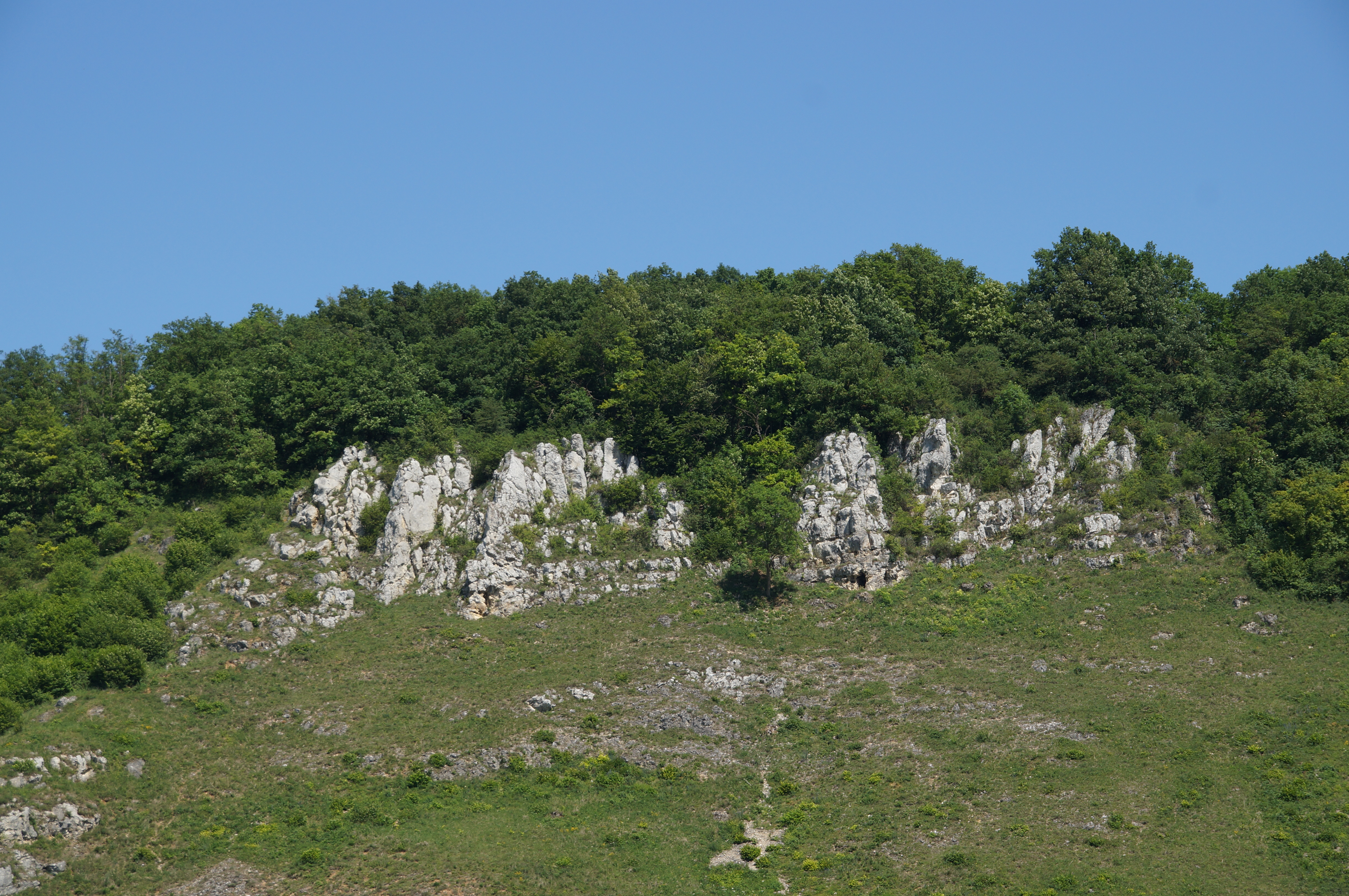 Felsformation im Süden des Keilbergs, oberhalb von Schwabelweis, Regensburg, Geotop-Nr.: 362R001